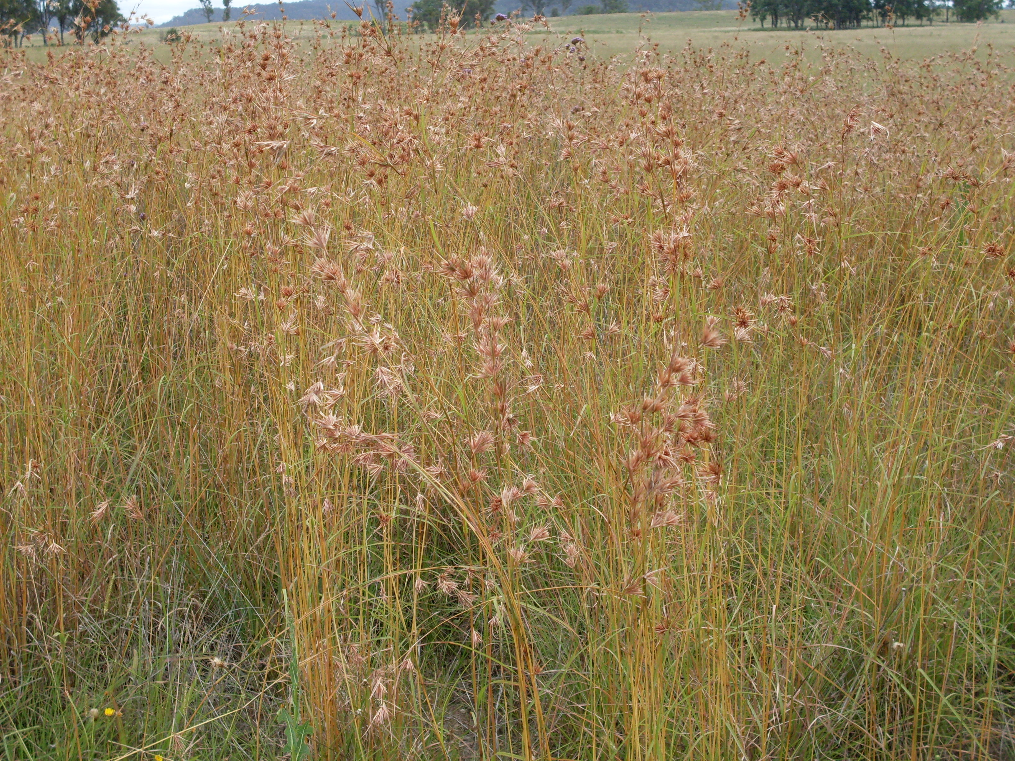 Kangaroo grass Themeda triandra aka Themeda australis. Near Ulan, NSW Australia, January 2009.